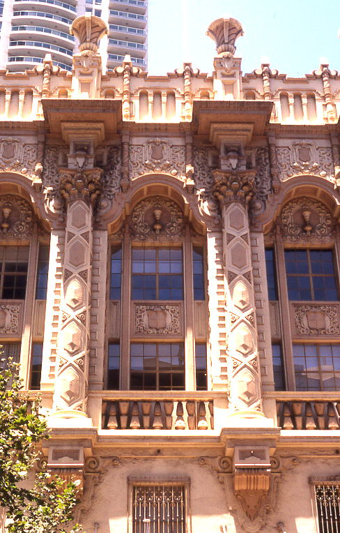 plaza cinema, sydney